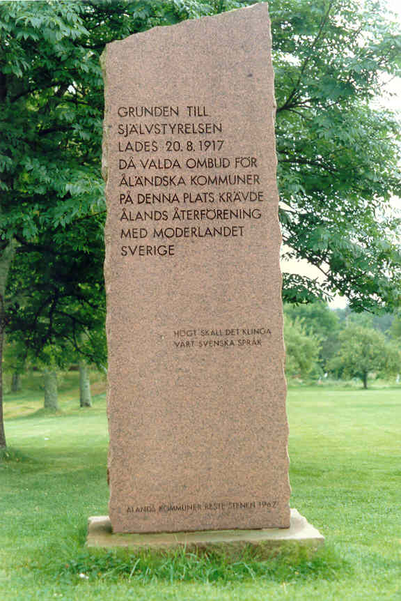 Minnessten över självstyrelsen, vid Ålands folkhögskola. En bild tagen av Harri Blomberg, september 1990.